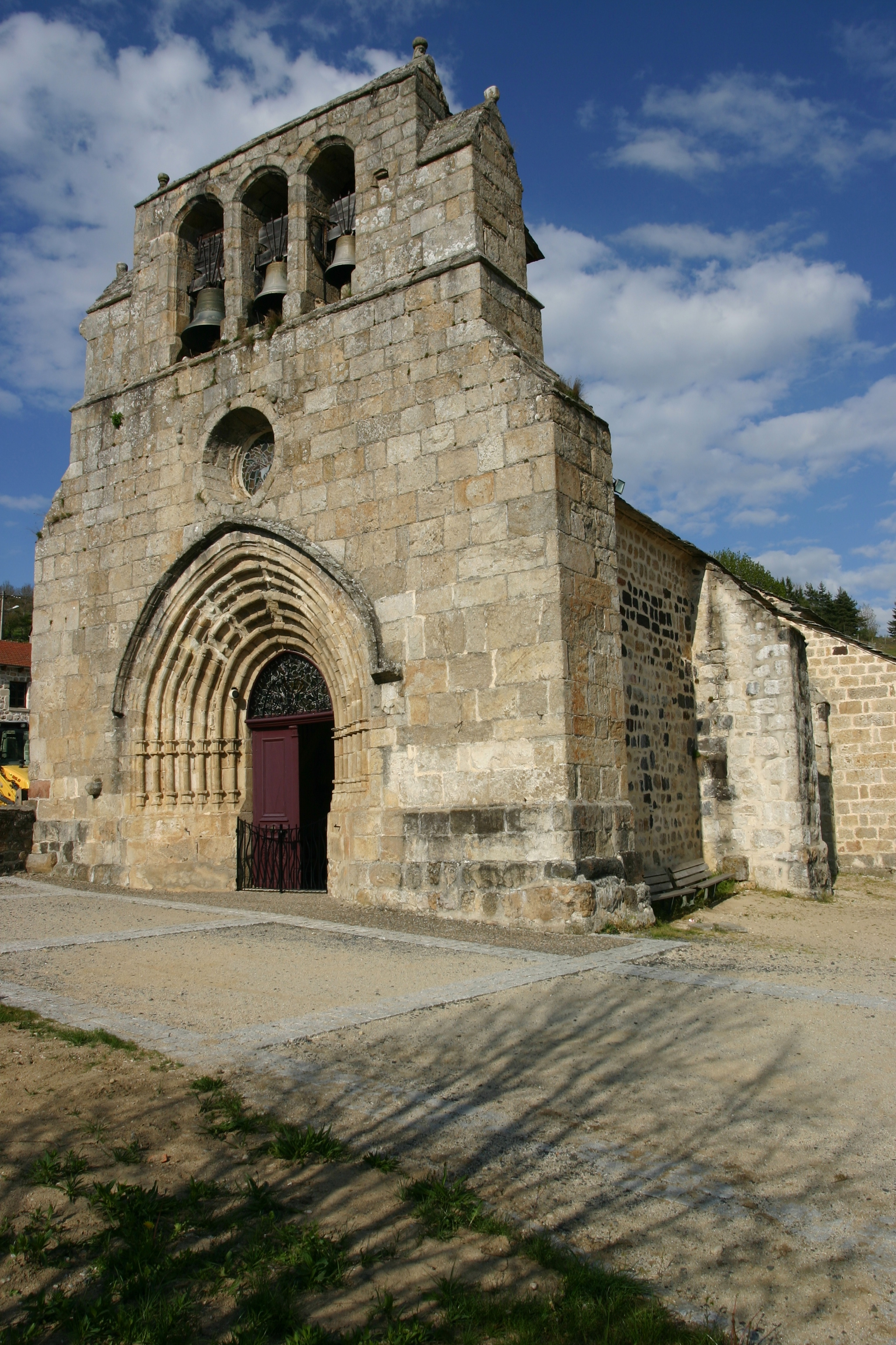 Eglise Saint Pierre - Sallettes (Haute Loire) .